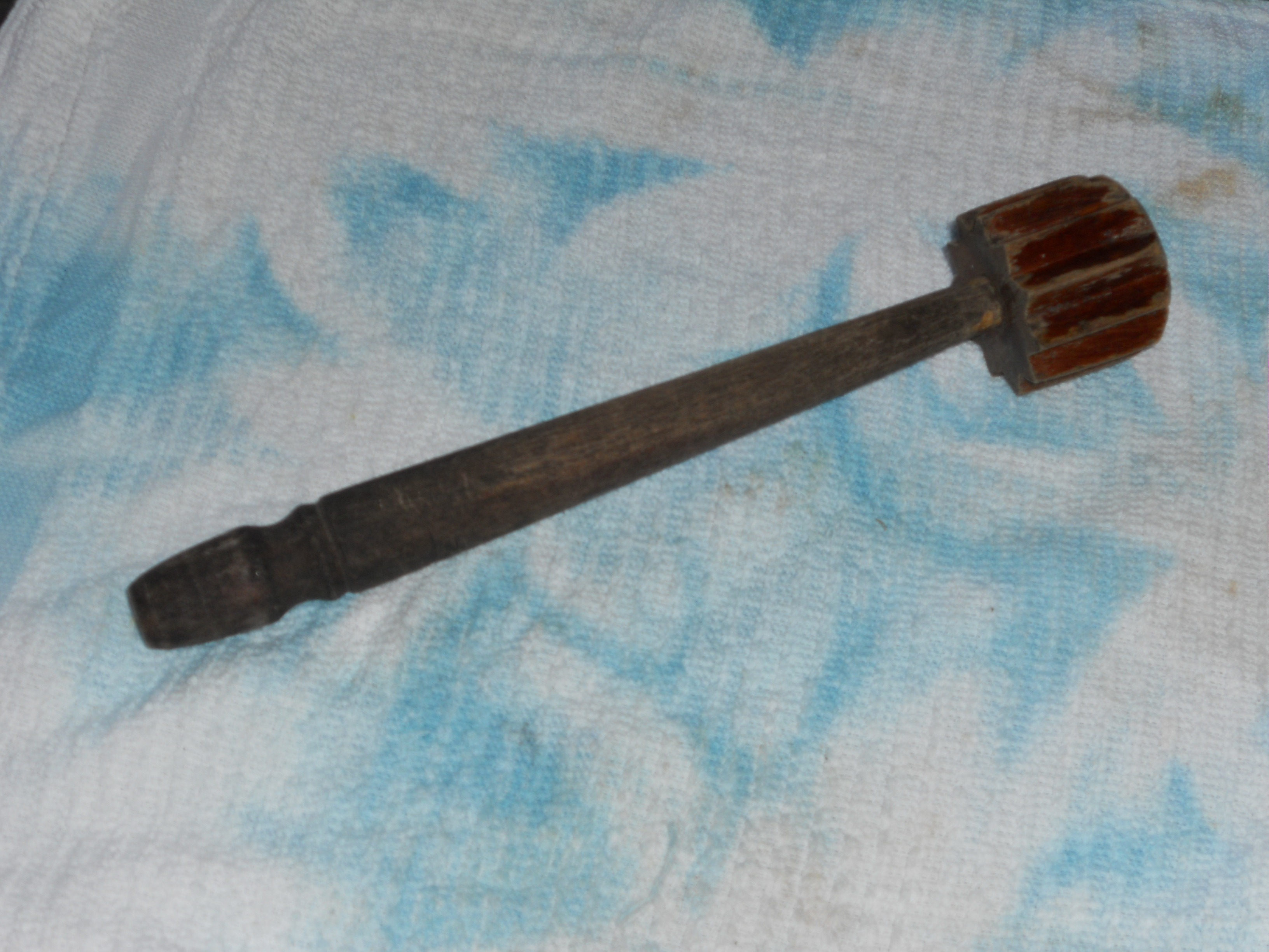 തൈര് കടയാൻ ഉപയോഗിക്കുന്ന മത്ത്